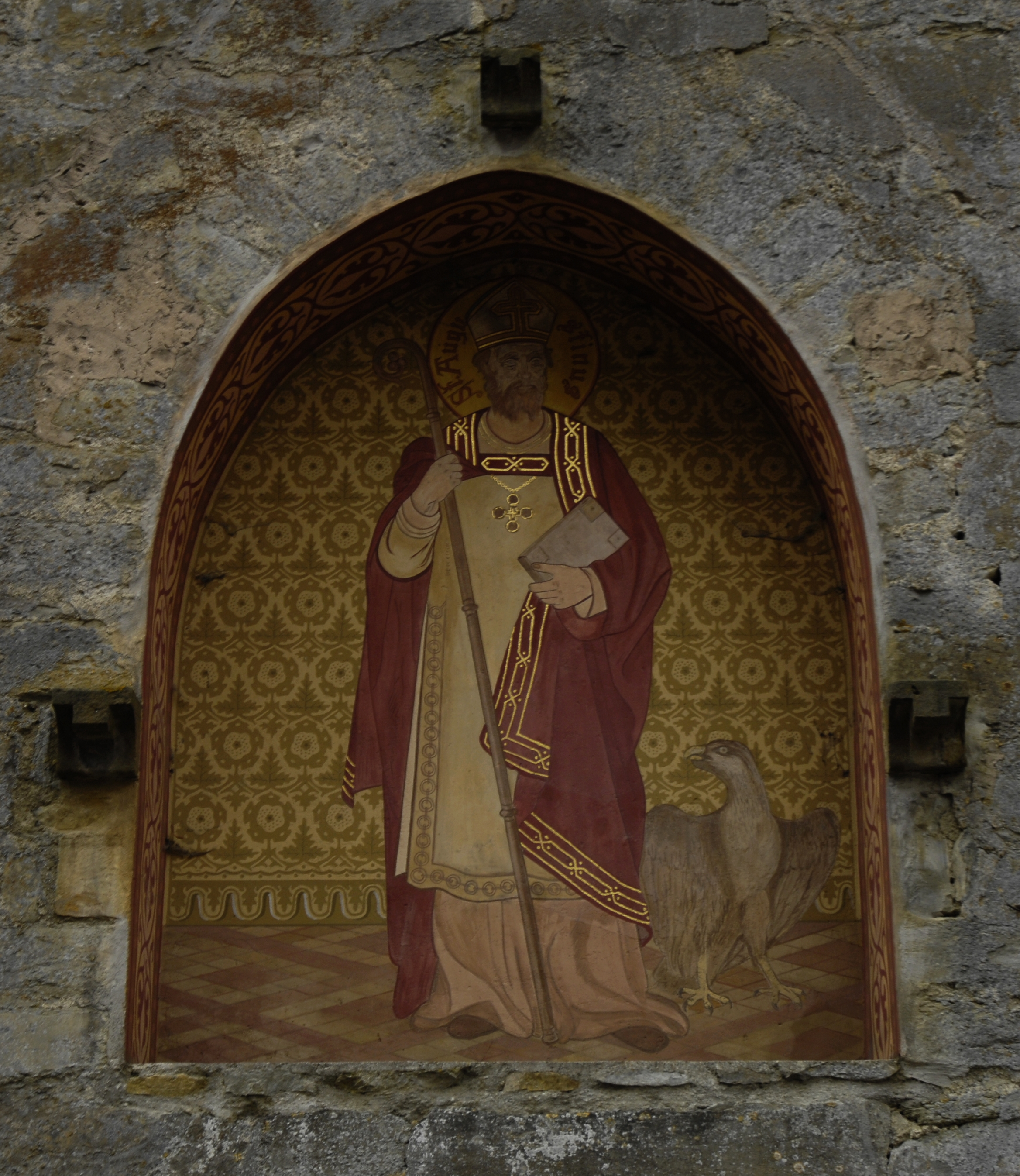 Heiligenbild (St. Augustinus) am Torhaus von Kloster Böddeken